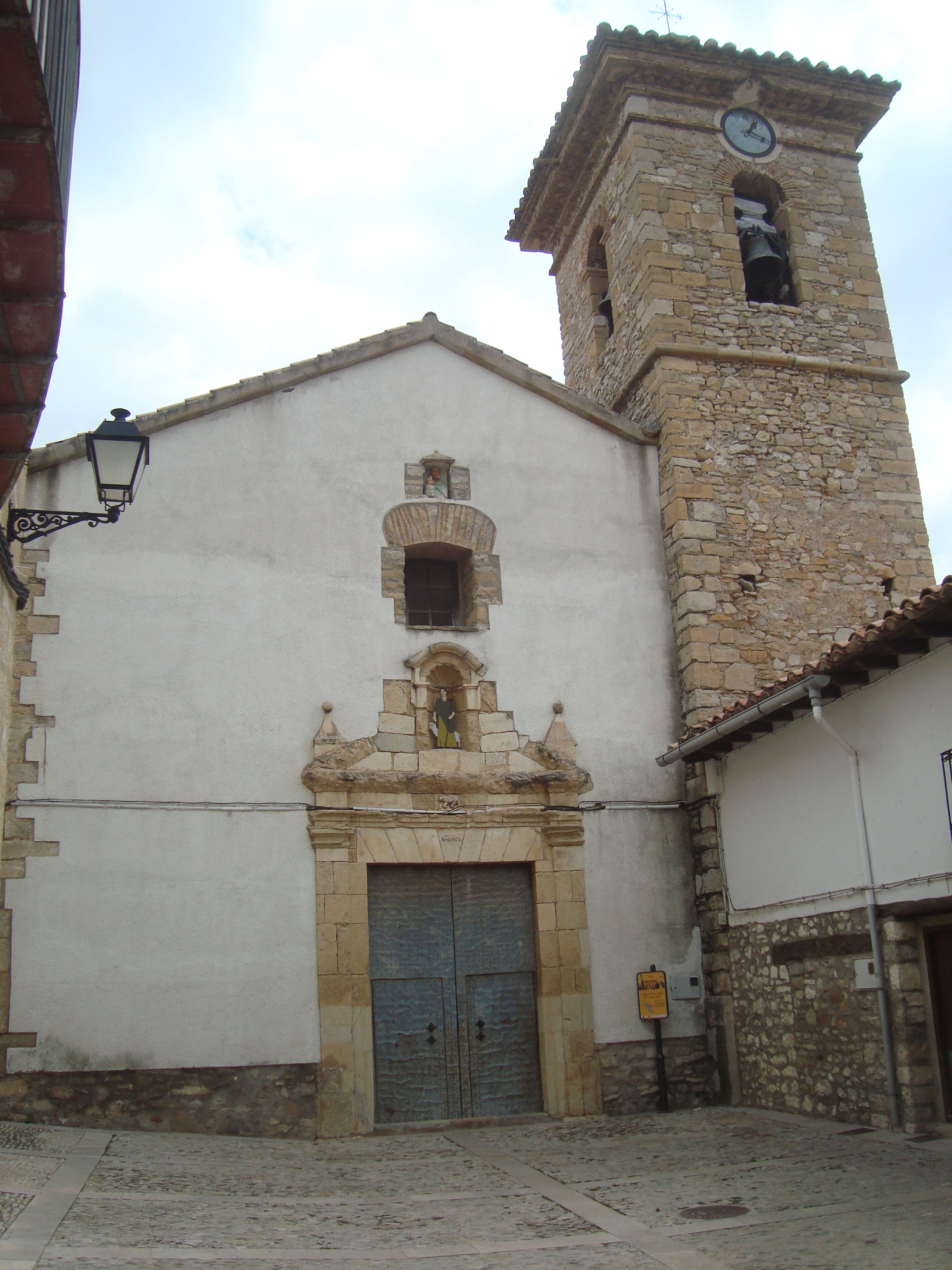 Església parroquial dels Sants Joans (Villores) 01.137-001.